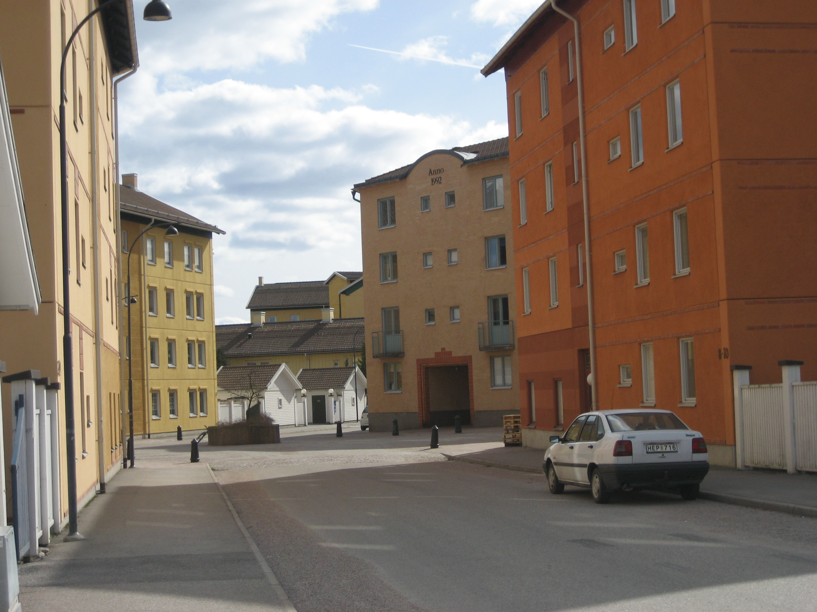 Ladugårdsängen, Örebro, Sweden